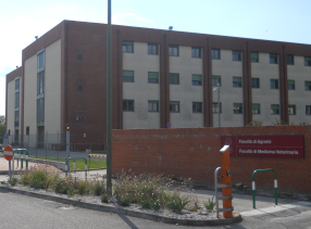 Sede della Facolta' di Agraria e Medicina Veterinaria presso Legnaro (PD)